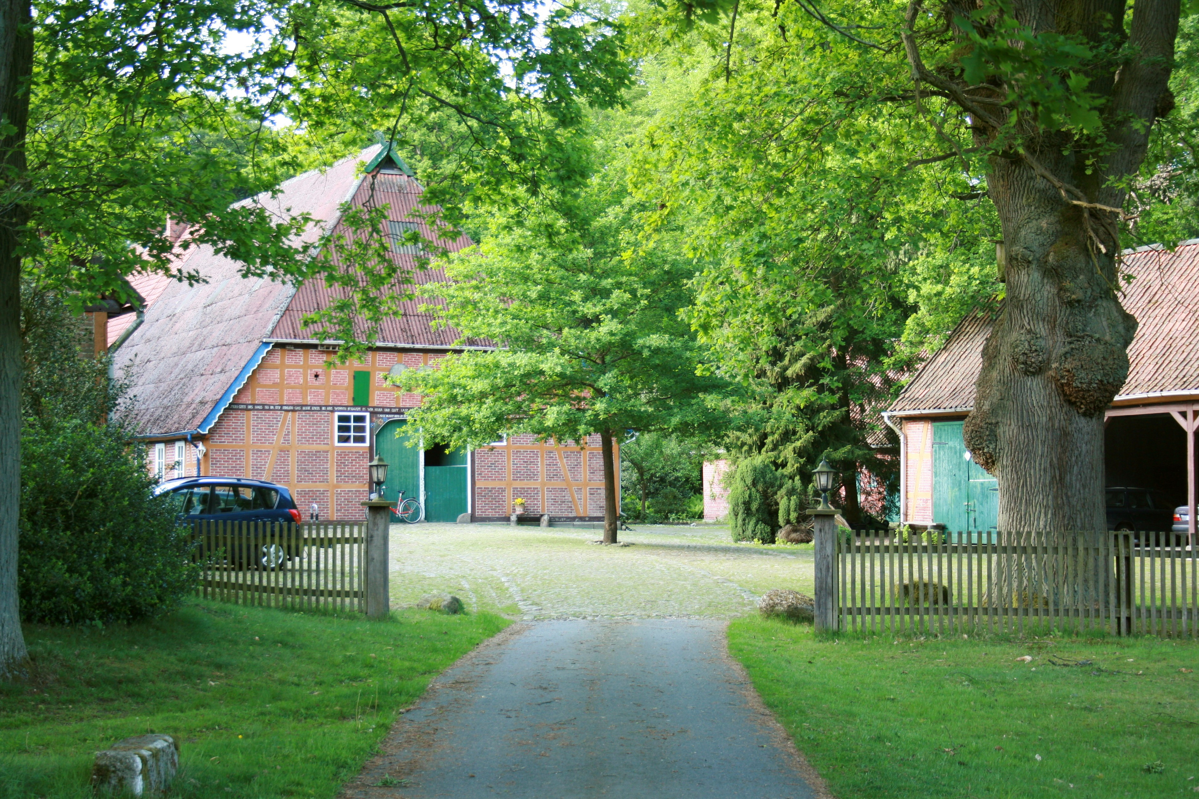 Hof Limbeck, Gilmerdingen in Neuenkirchen (Lüneburger Heide)